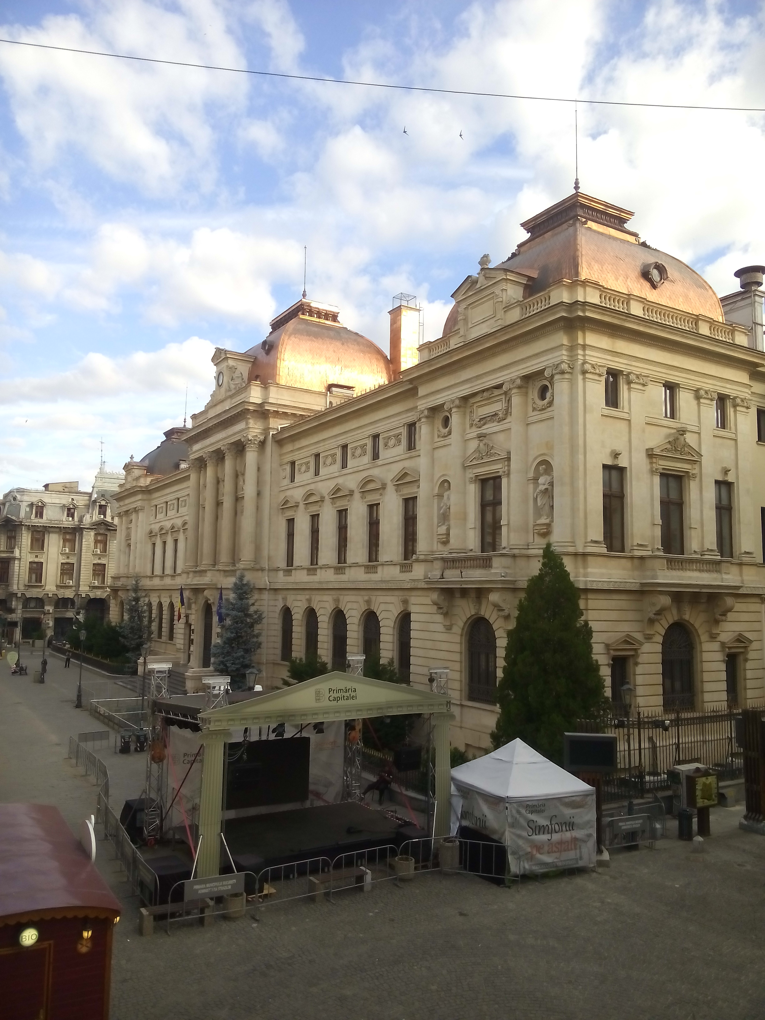 Національний банк Румунії (старе приміщення). Історичний Бухареста. Червень 2018. Вид із вікна хостелу "Маленький Бухарест".